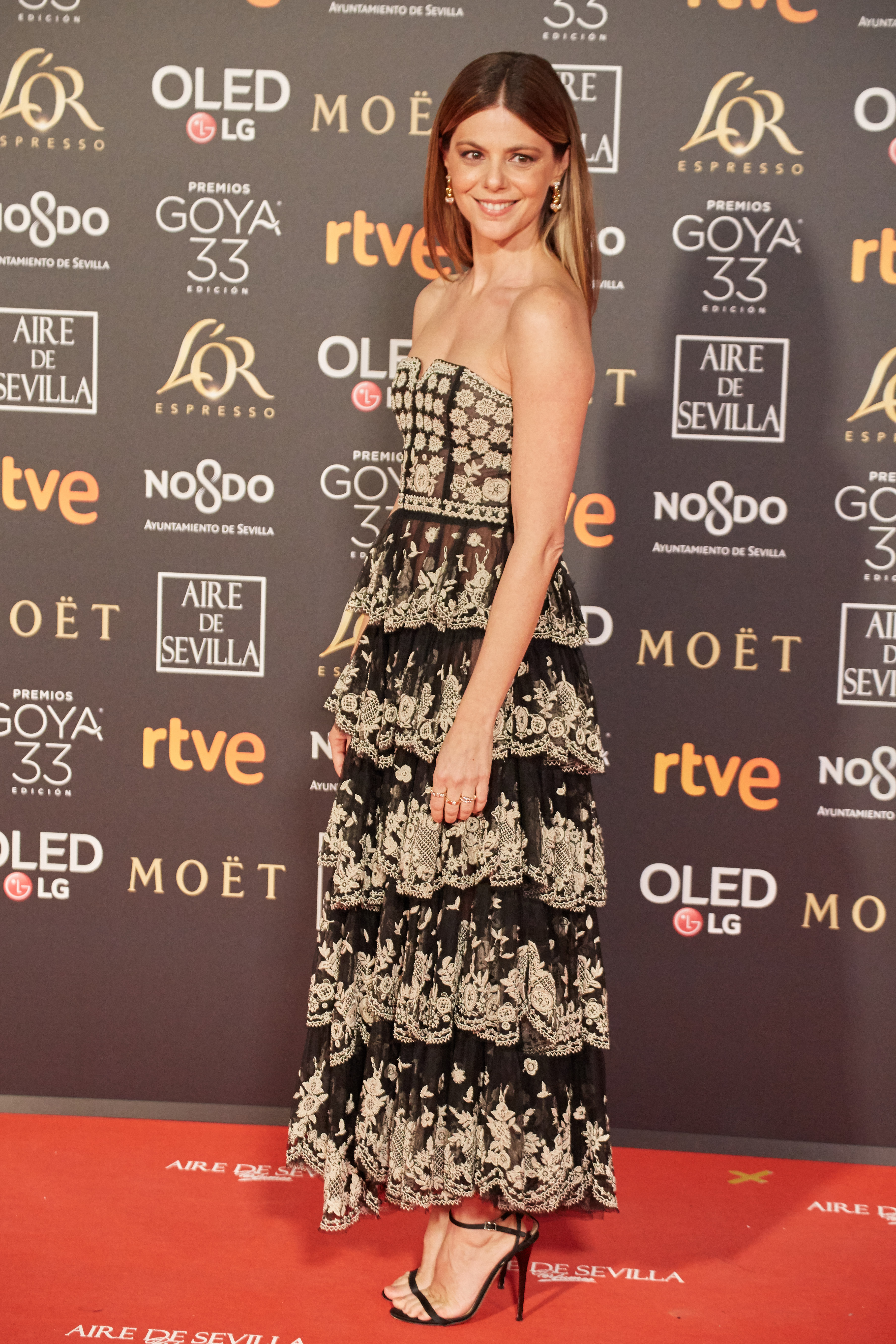 Manuela Velasco en la alfombra roja de los Premios Goya celebrados en Sevilla en Febrero 2019